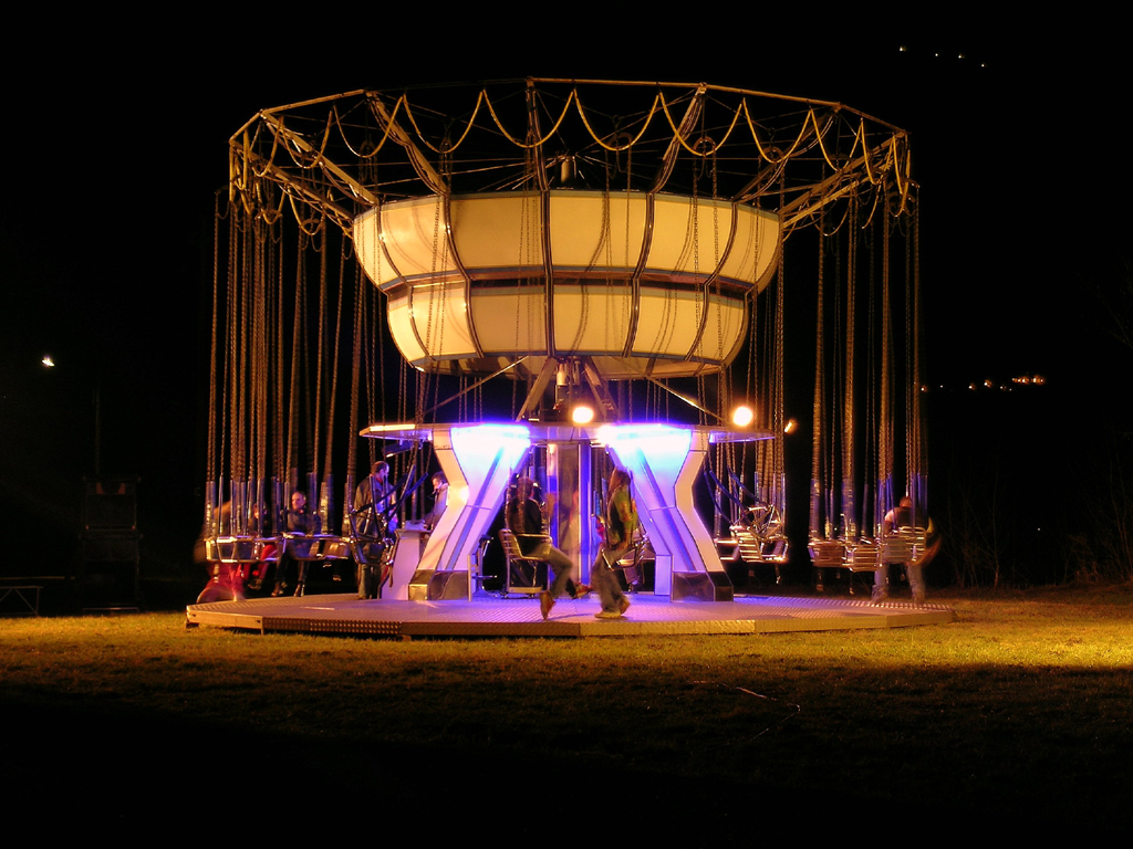 "Calcinculo", Luna Park's game.